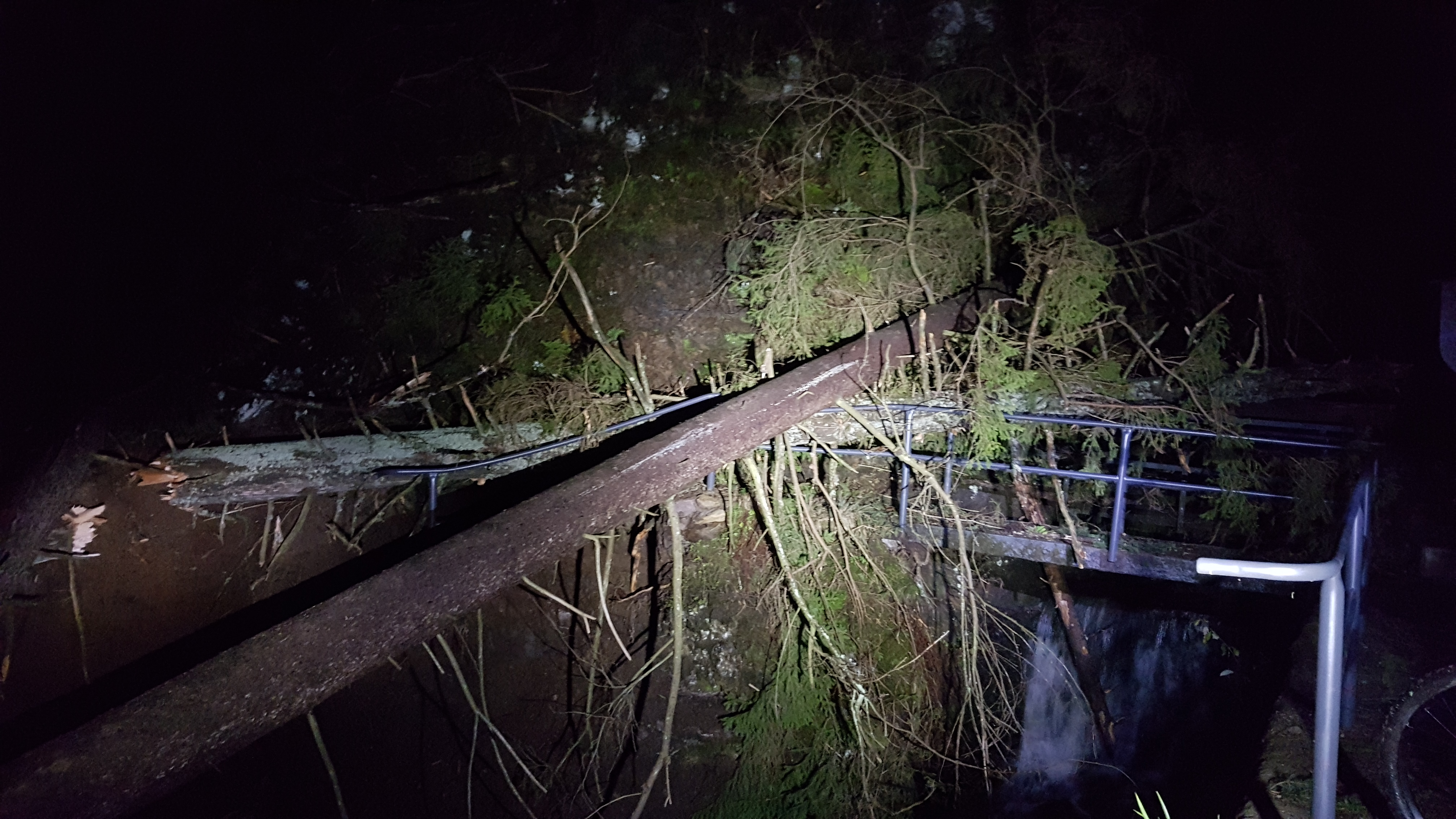 Die Brücke am Nabentaler Wasserfall nach den Herbststürmen 2017, aufgenommen am 04.11.2017